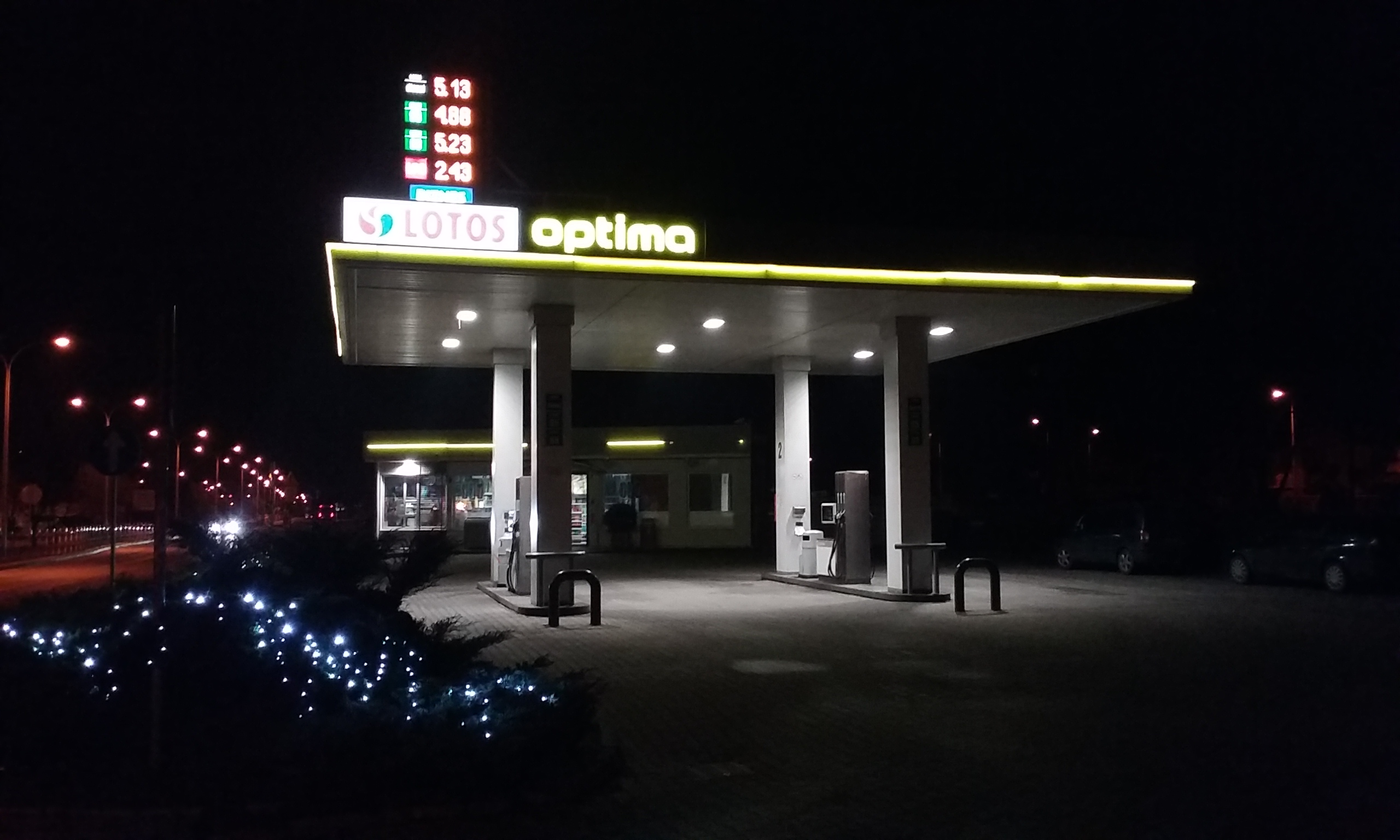 Stacja benzynowa Lotos w 60-tysięcznym Tomaszowie Mazowieckim _ Lotos petrol station in sixty thousandths Tomaszów Mazowiecki, Poland